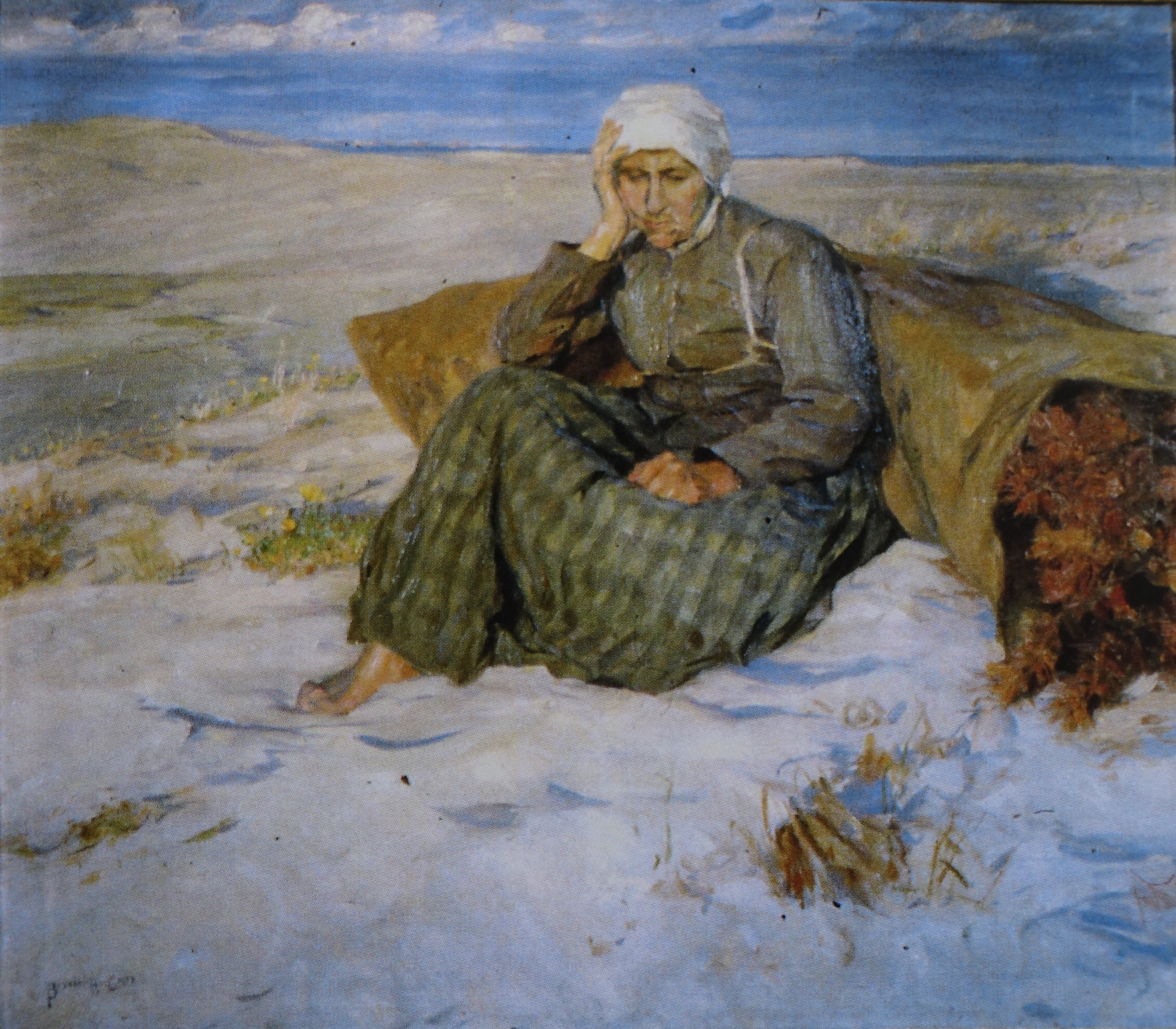 Gemälde